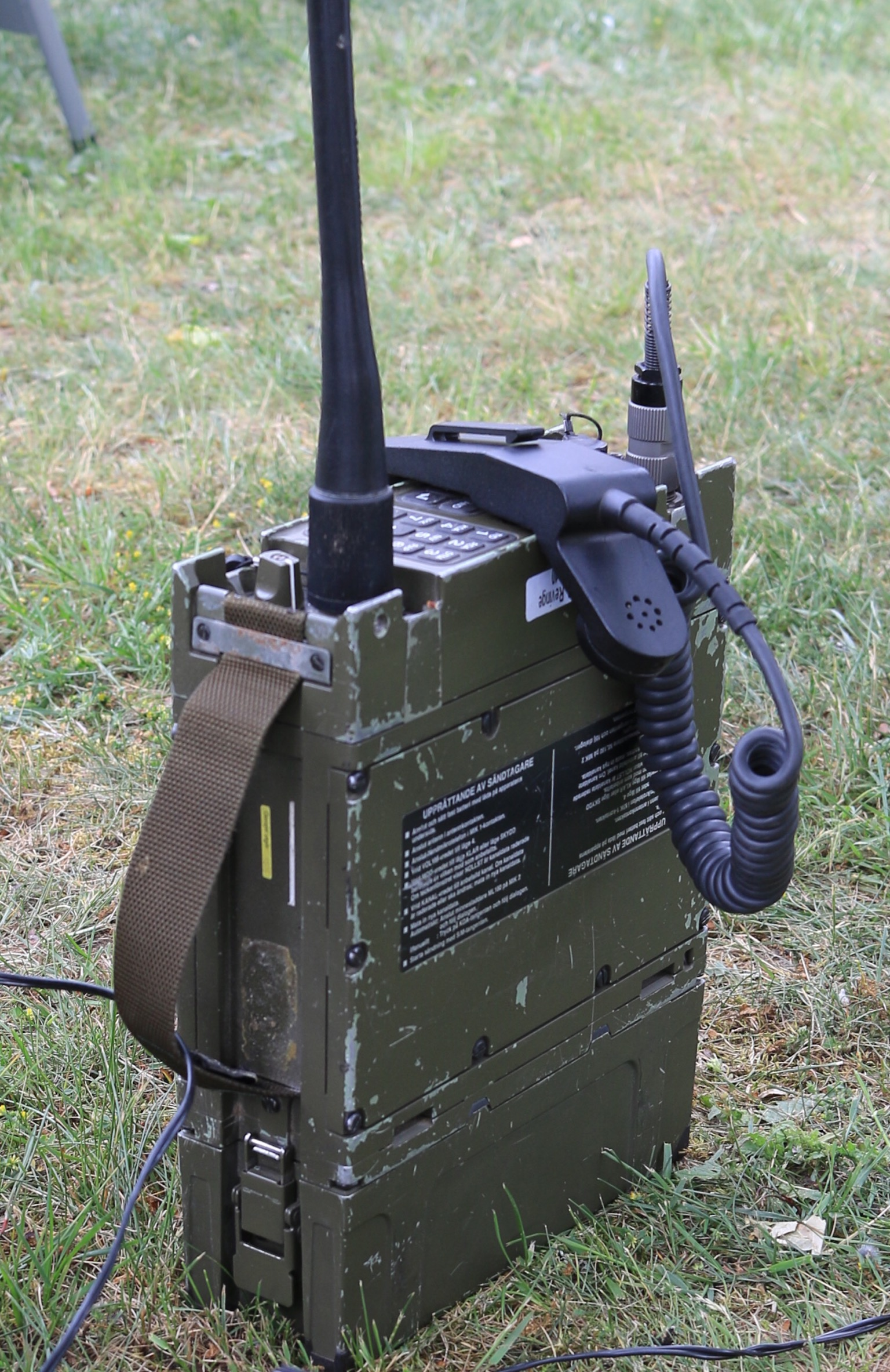 Radio 180 Revinge 2019